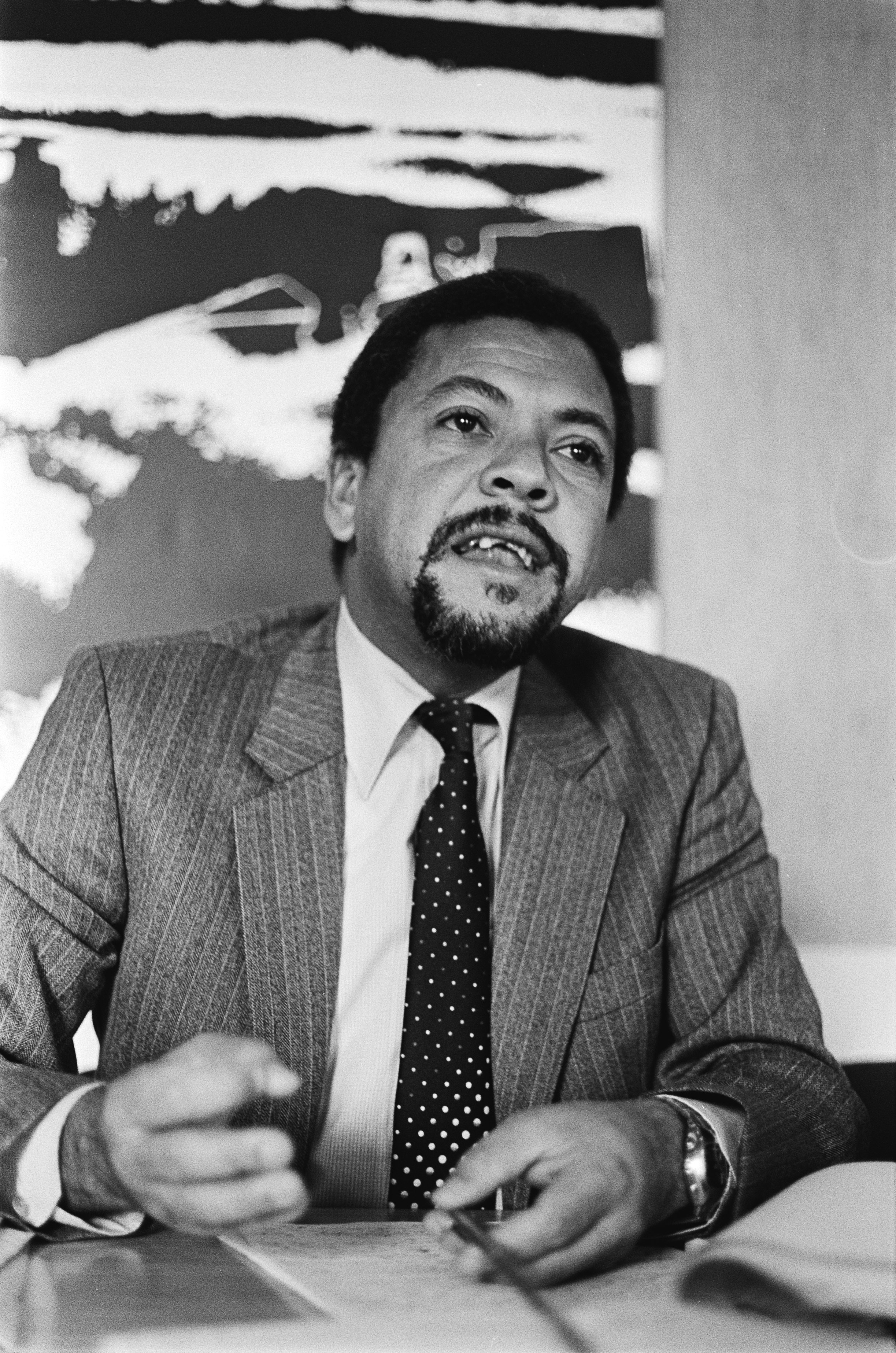 Collectie / Archief : Fotocollectie Anefo Reportage / Serie : [ onbekend ] Beschrijving : Leider van Angolese leger Luitenant kolonel Roberto Monteiro (bijnaam Ngongo) tijdens persconferentie op Nieuwspoort Datum : 5 april 1982 Trefwoorden : persconferenties Instellingsnaam : Nieuwspoort Fotograaf : Antonisse, Marcel / Anefo Auteursrechthebbende : Nationaal Archief Materiaalsoort : Negatief (zwart/wit) Nummer archiefinventaris : bekijk toegang 2.24.01.05 Bestanddeelnummer : 932-0893